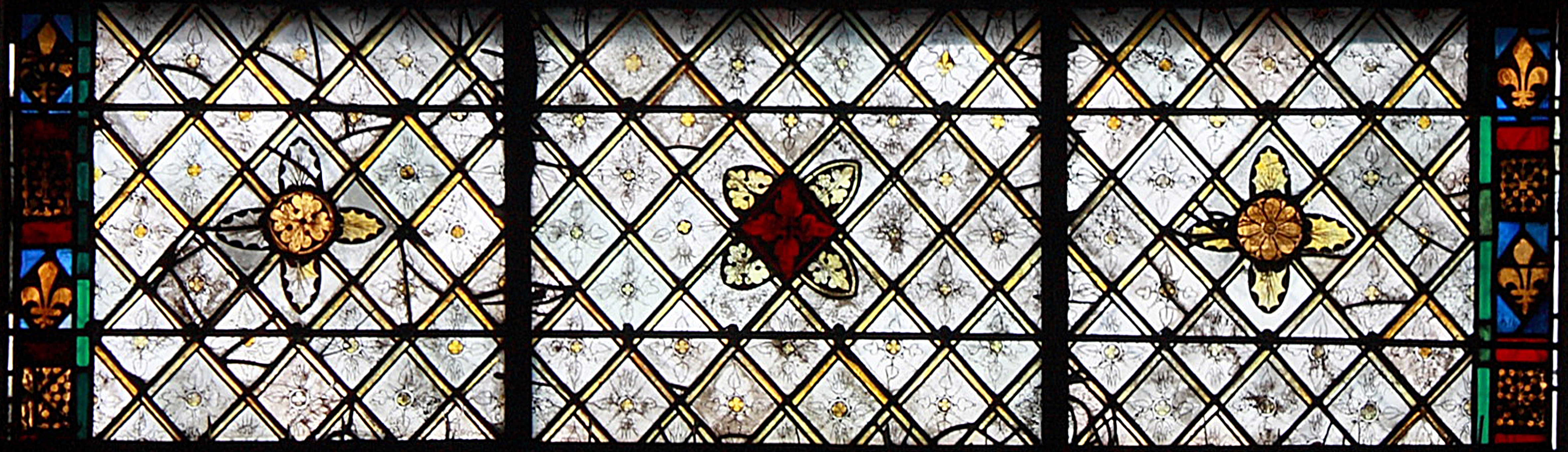 "Grisaille" du vitrail de l'Annonciation